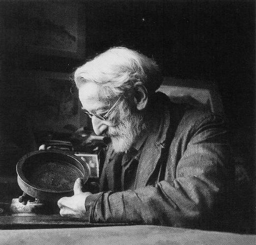 Photographie du peintre Henri Rivière